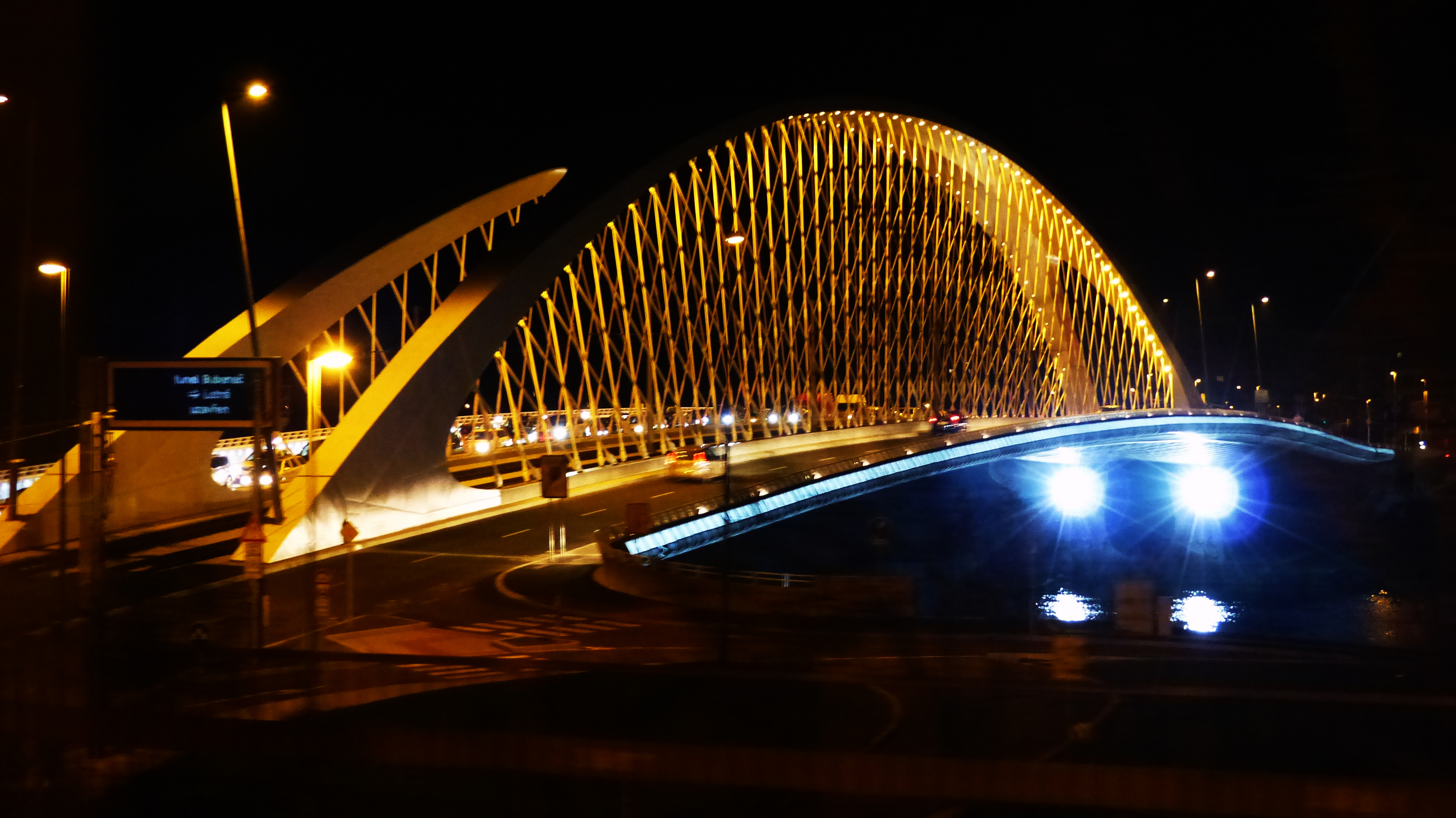 Troja-Brücke (Trojský most) in Prag, sie verbindet die Stadtteile Holešovice (Holleschowitz) und Troja, eingeweiht im Oktober 2014